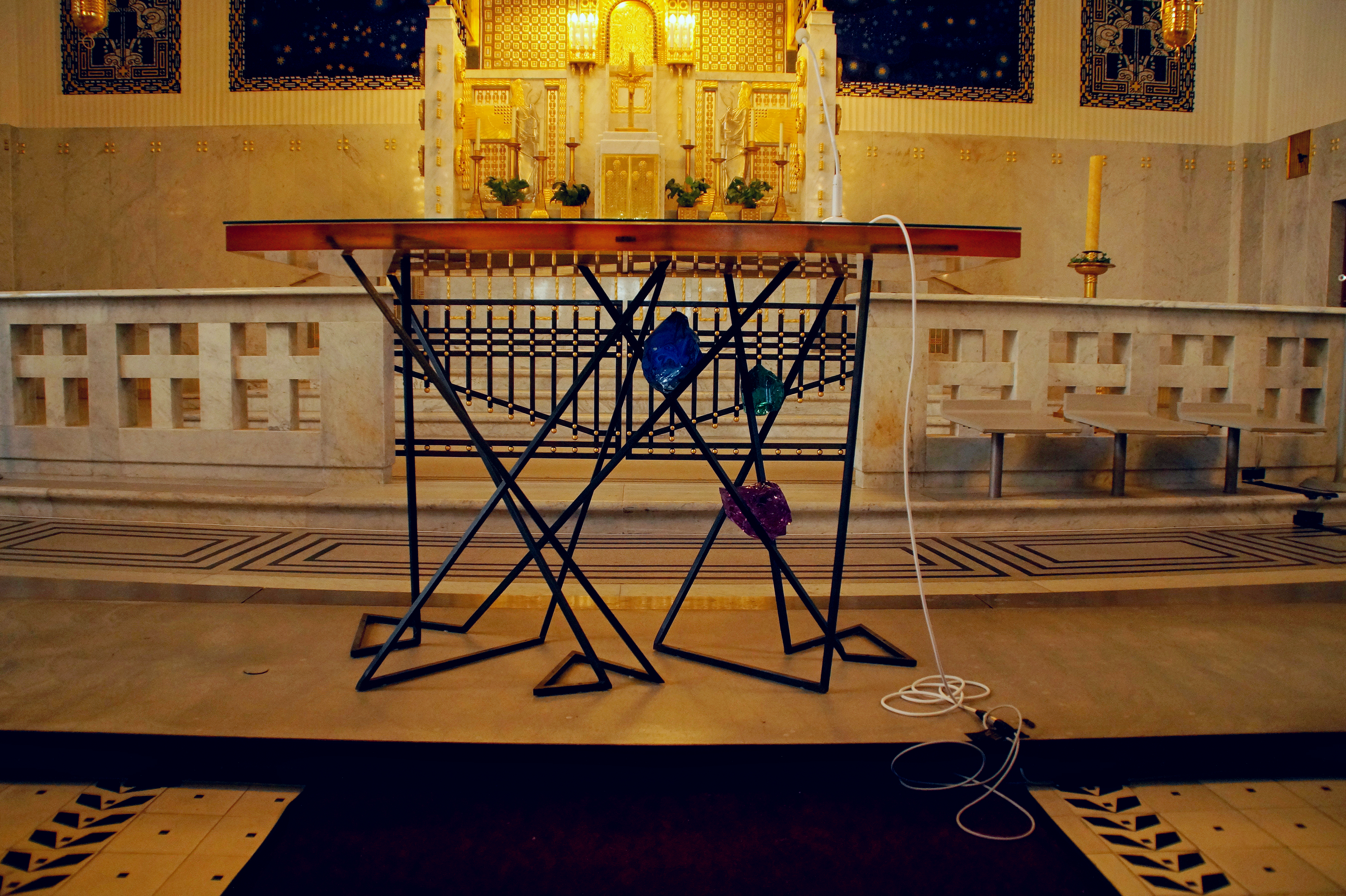 Otto Wagner Kirche hl. Leopold Am Steinhof, Innenansicht, Volksaltar